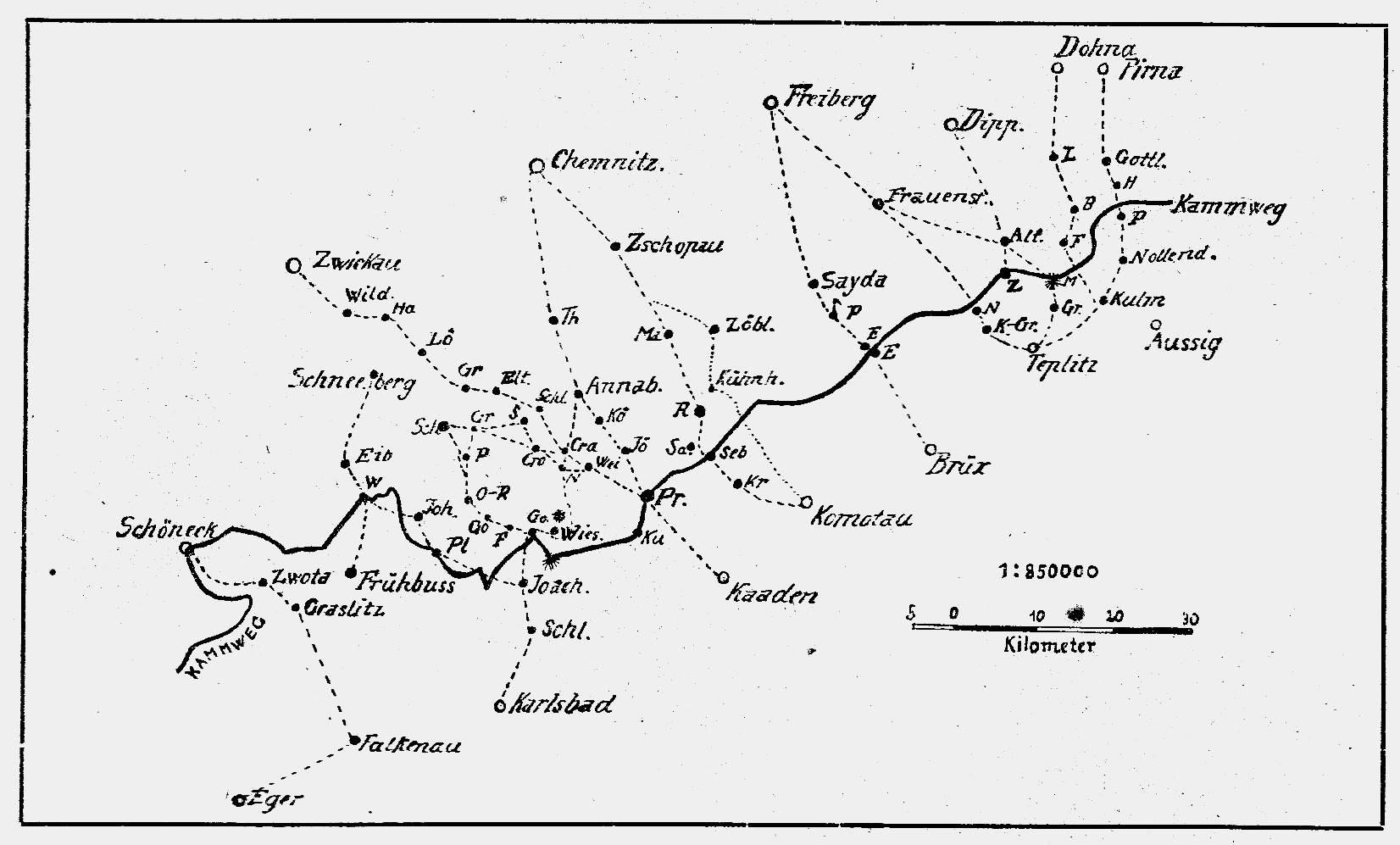 Die Pässe des Erzgebirges